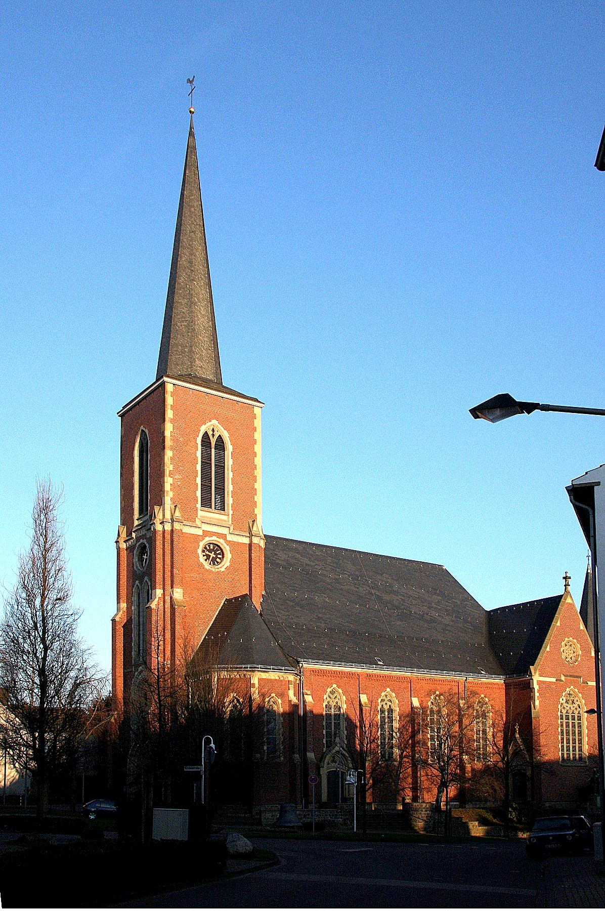 Pfarrkirche St. Petrus und Paulus in Würselen/Bardenberg. Ansicht aus südlicher Richtung.